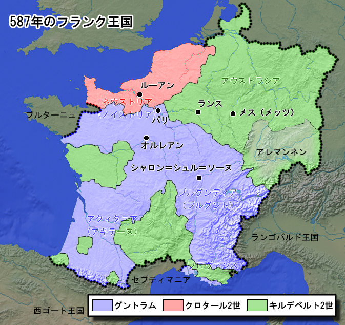 587年のフランク王国の分割相続。